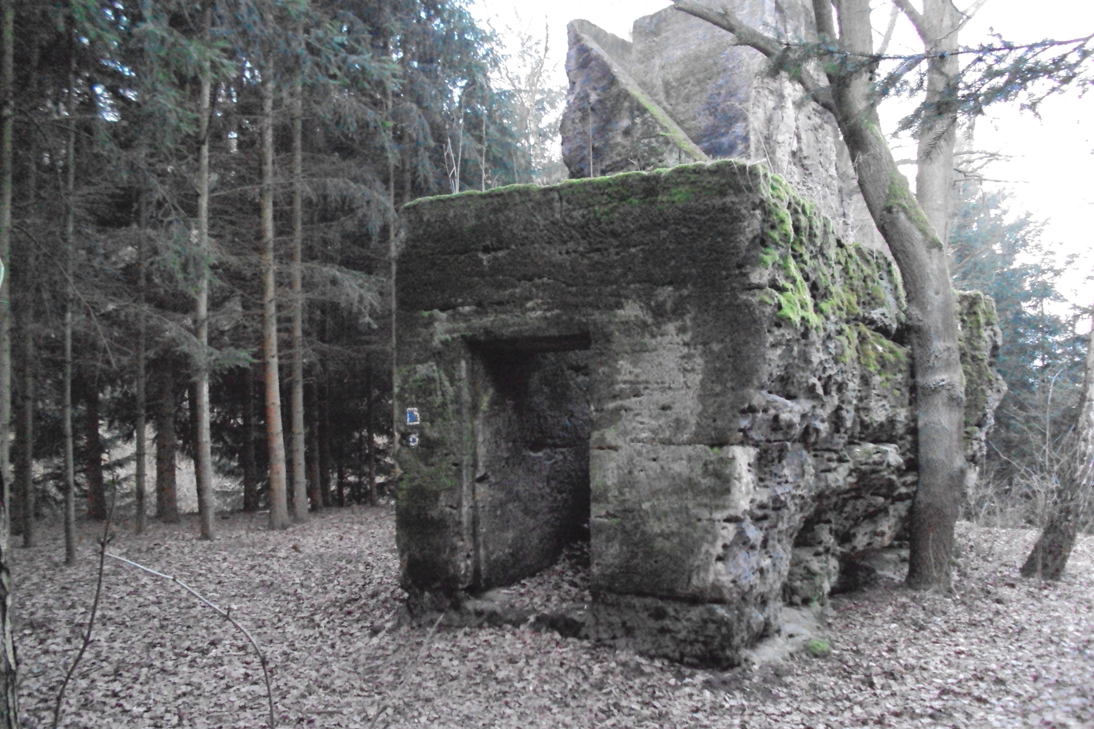 Zřícenina Jiljova u Holan